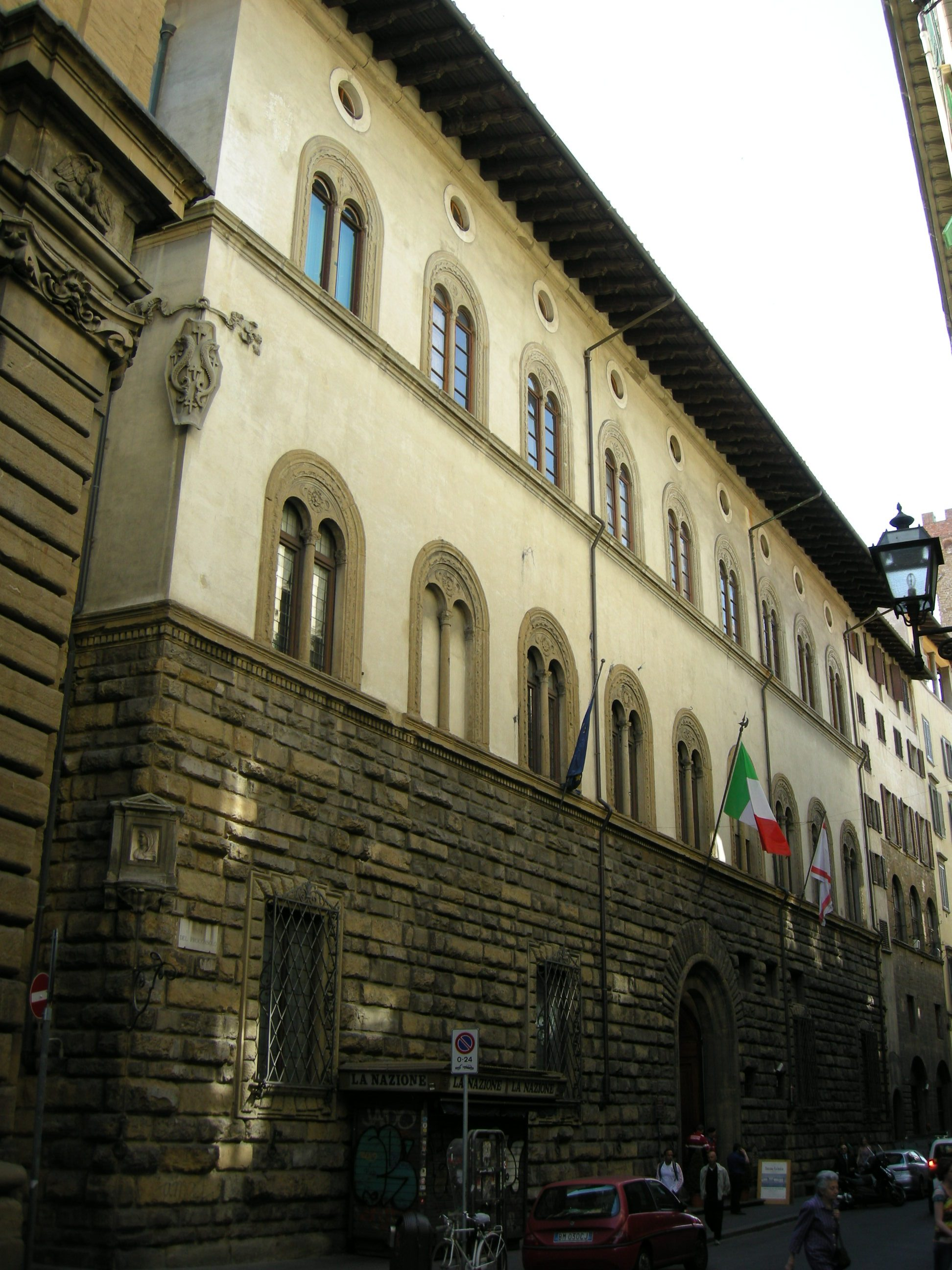 Palazzo pazzi della congiura